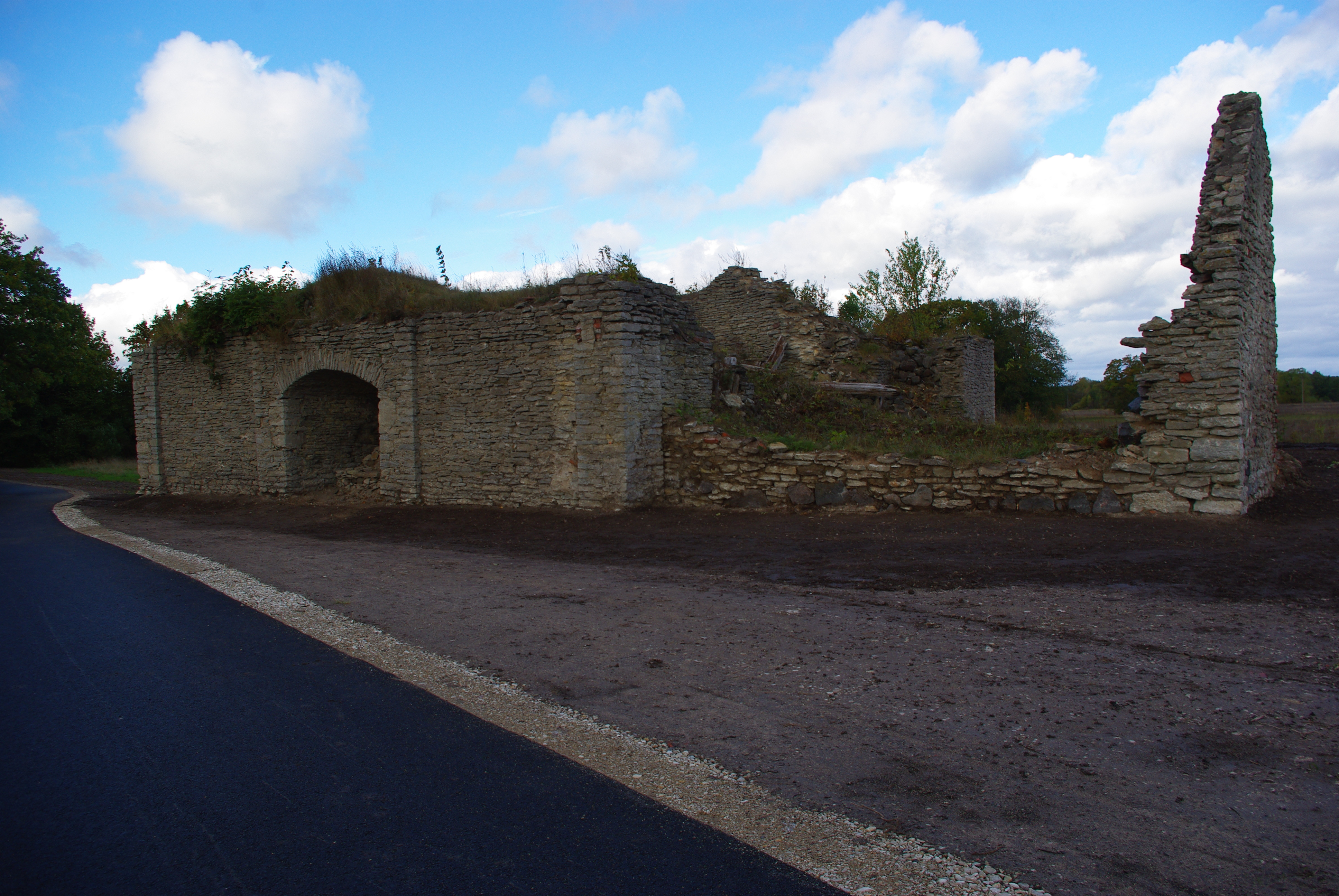 Suuremõisa mõisa tuuleveski